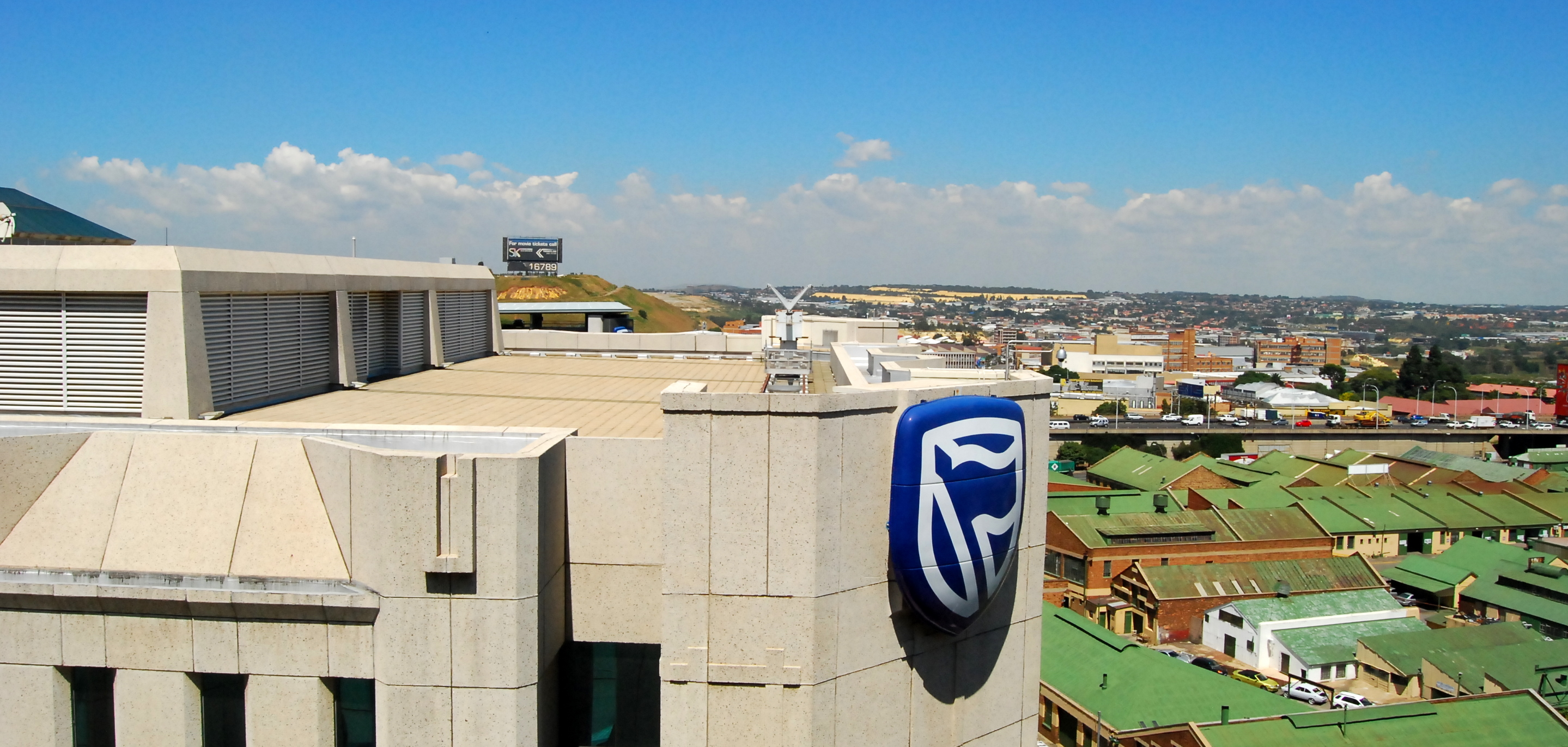 约翰内斯堡标准银行总部大楼的logo